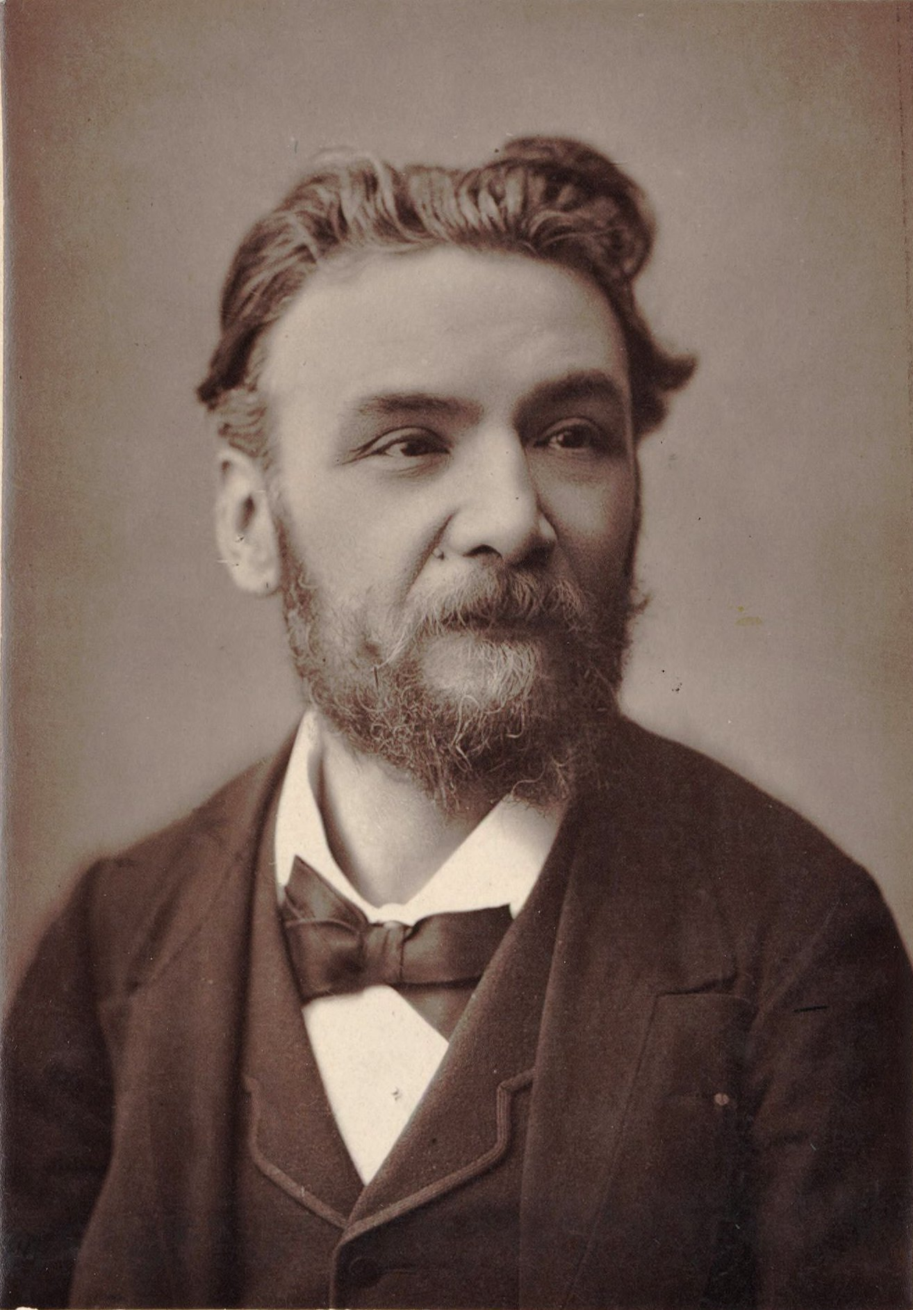 Ernest Guiraud (1837-1892), French composer